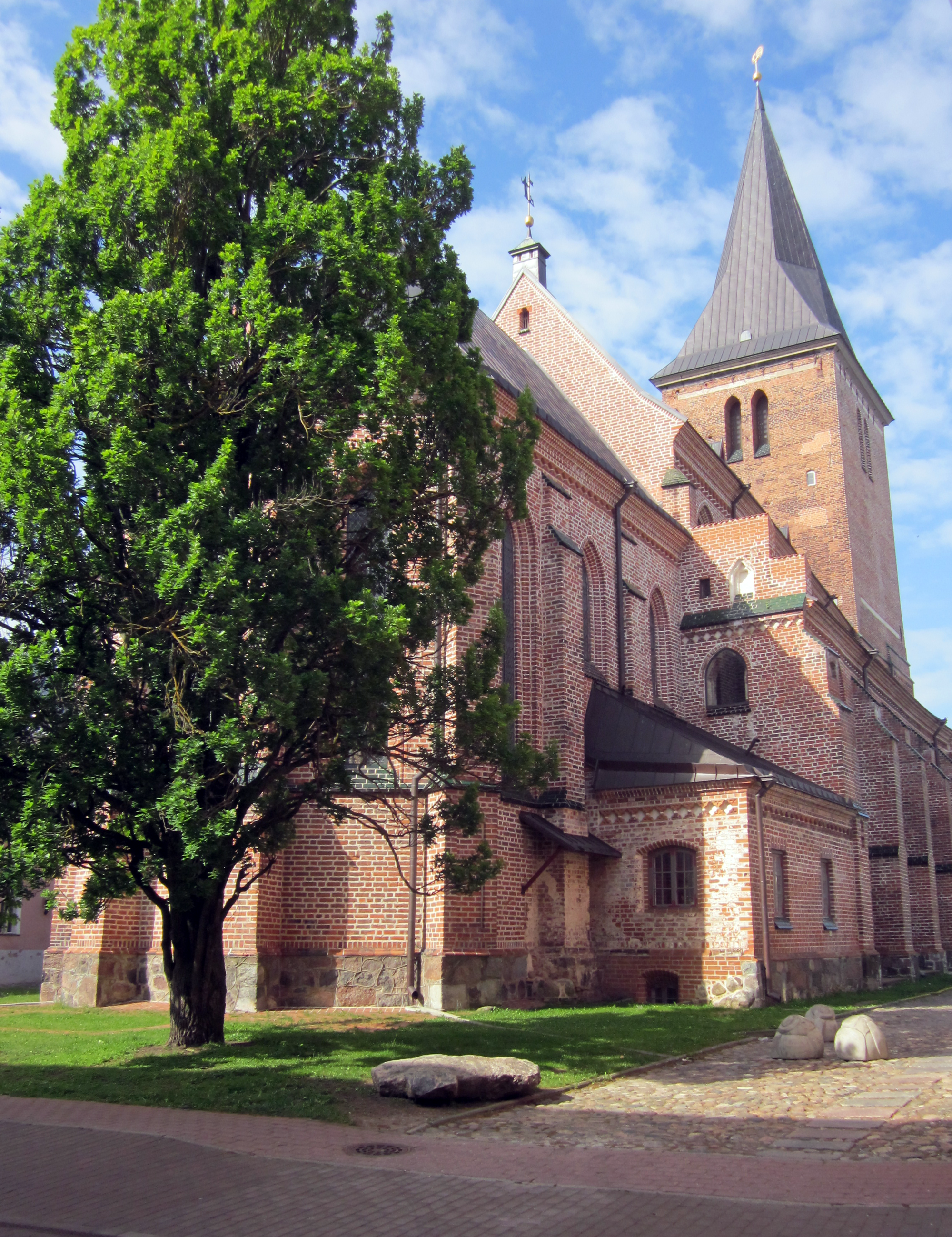 Tartu Jaani kirik idast